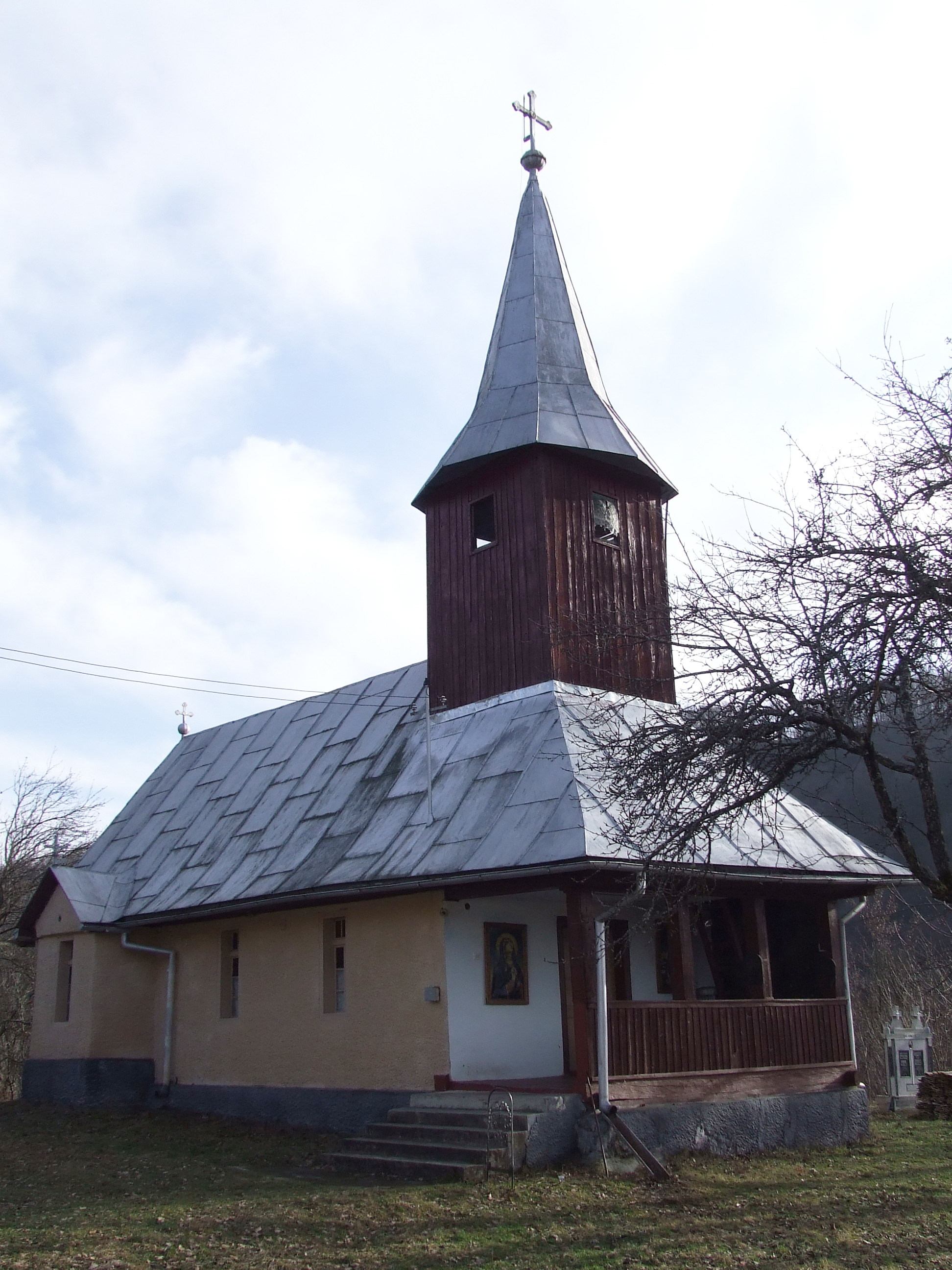 Biserica de lemn din Leurda, judeţul Cluj.